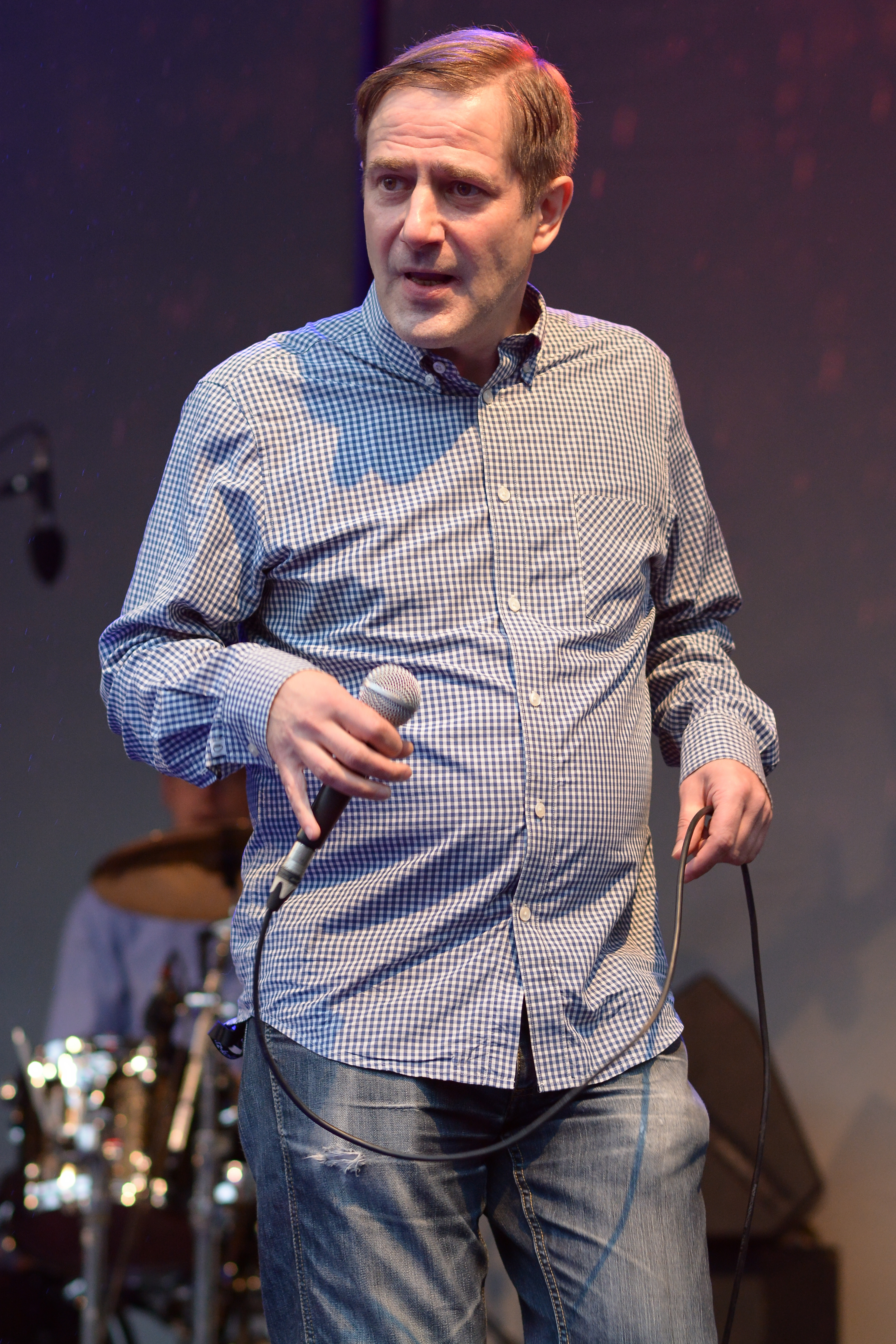 Andreas Dorau bei Essen.Original 2014